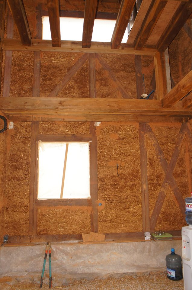 Πλήρωση τοιχοποιίας με καλούπια. Κατοικία στον Άγιο Νικόλαο Κρήτης.